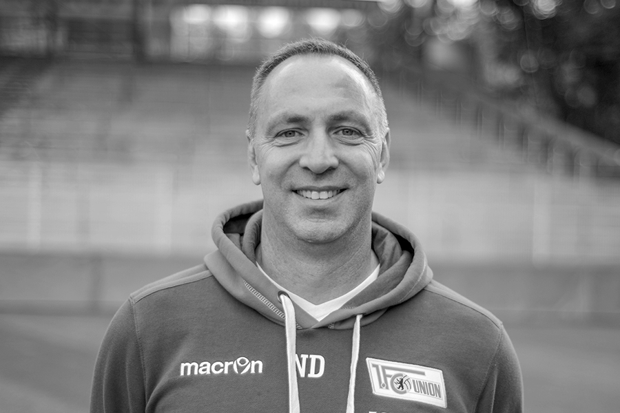 Mannschaftsfoto 2015/16